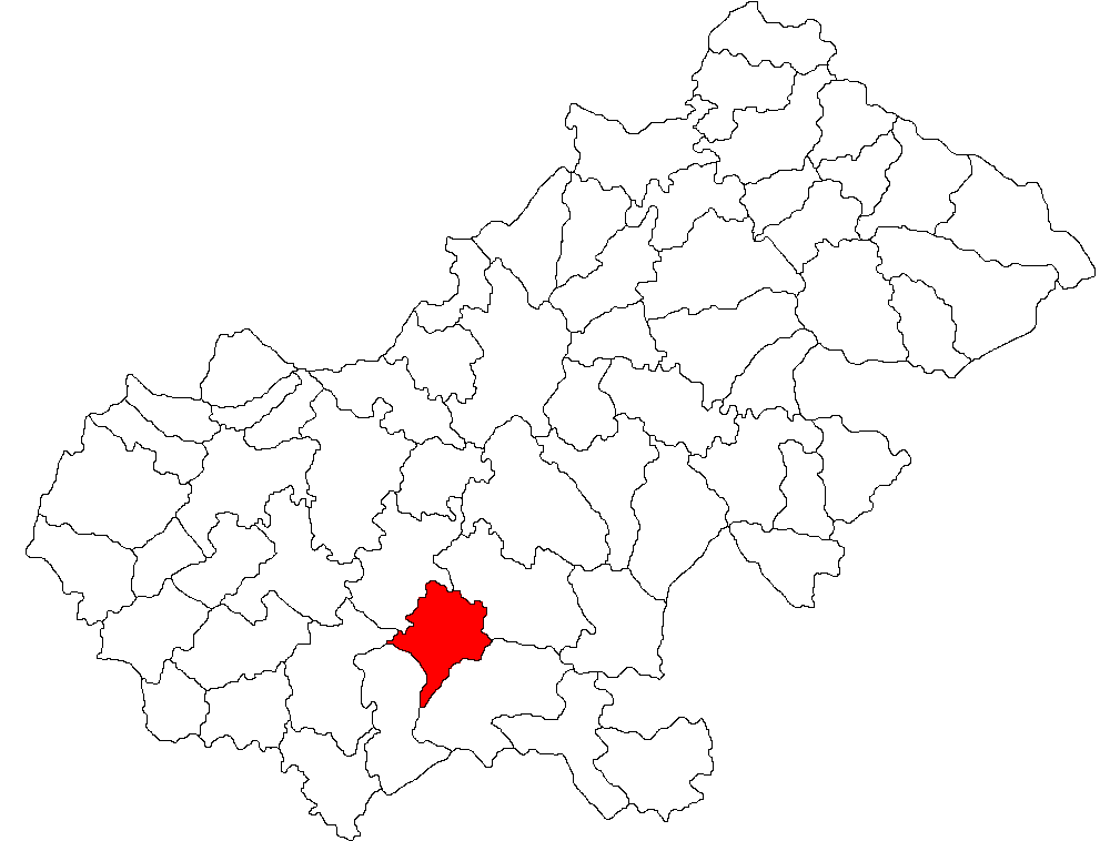 Categorie:Hărţi ale judeţului Satu Mare